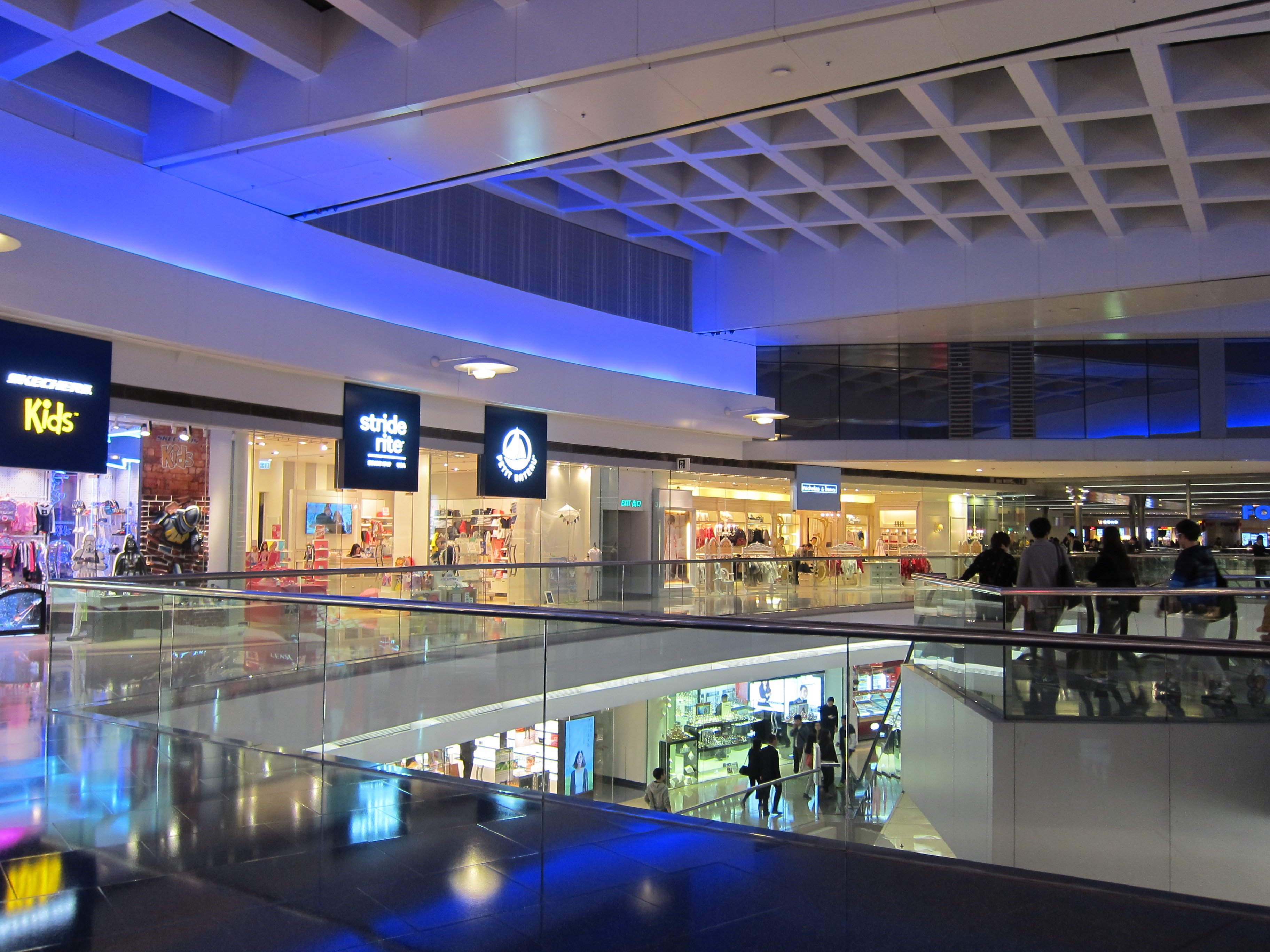 Festival Walk Level 2